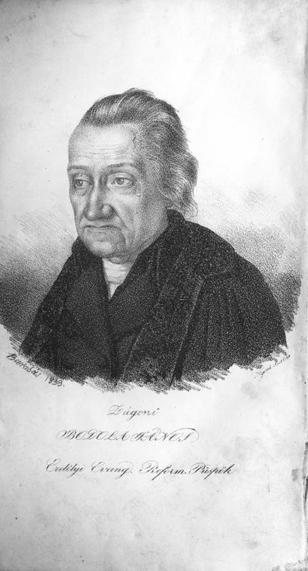 Bodola János erdélyi református püspök. Barabás Miklós ceruzarajza.